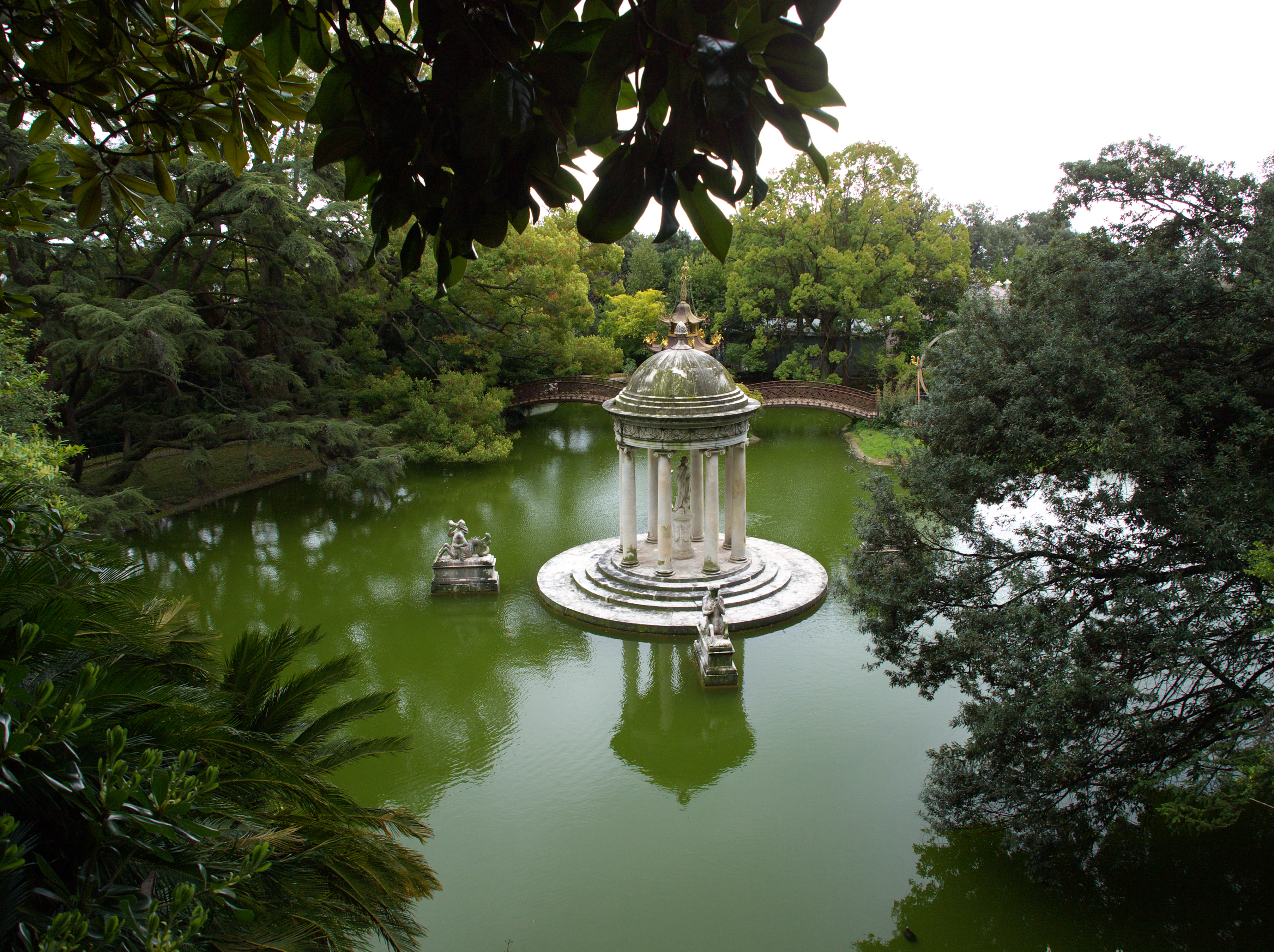 Parco e Villa Pallavicini This is a photo of a monument which is part of cultural heritage of Italy.